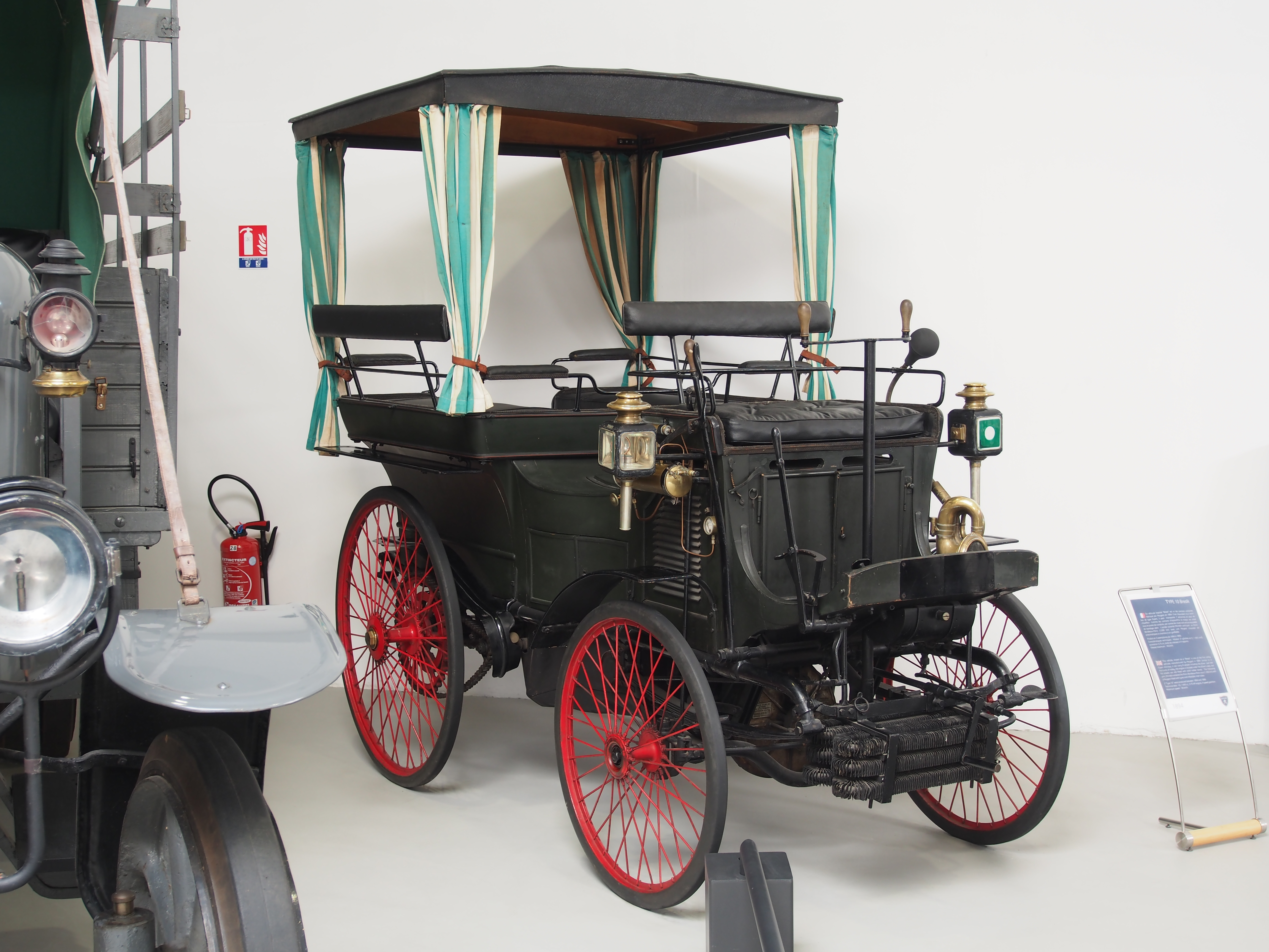 Photographed at the Musée de l'Aventure Peugeot-Sochaux, France.